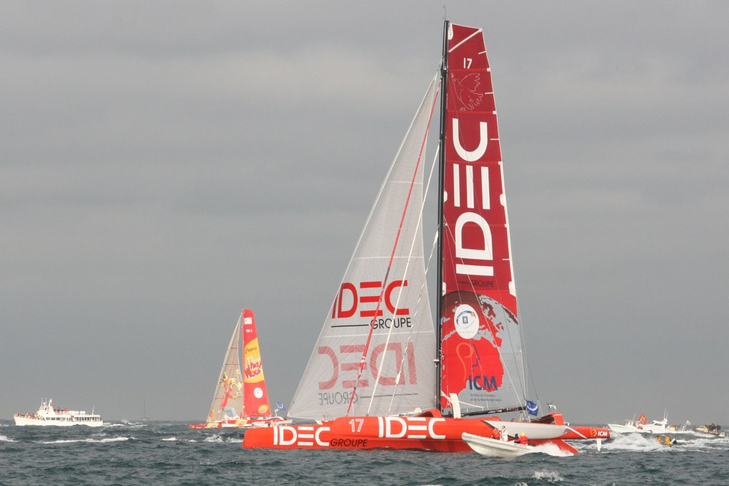 Idec devant Crêpes Whaou ! 3